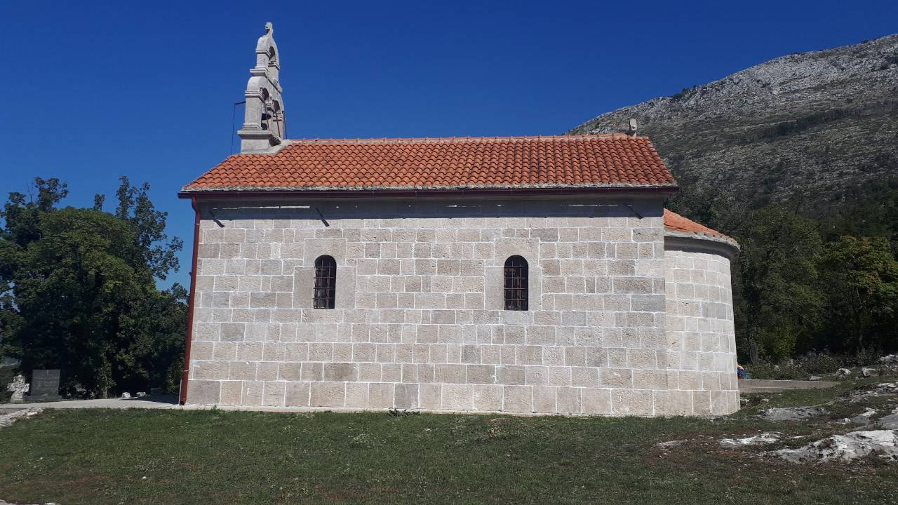 Храм Св. пророка Илије